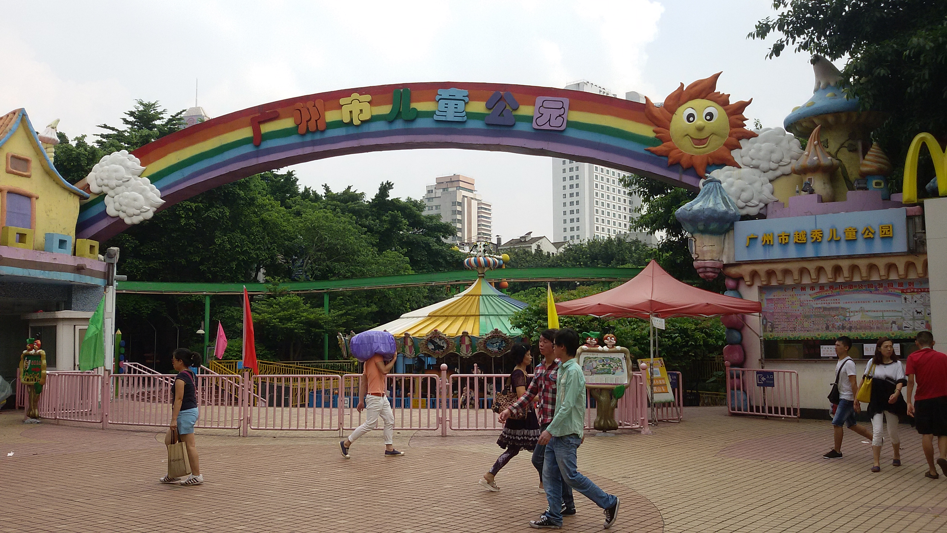 粵語: 2014年初，廣州市兒童公園重喺而家人民南嘅十三行附近。